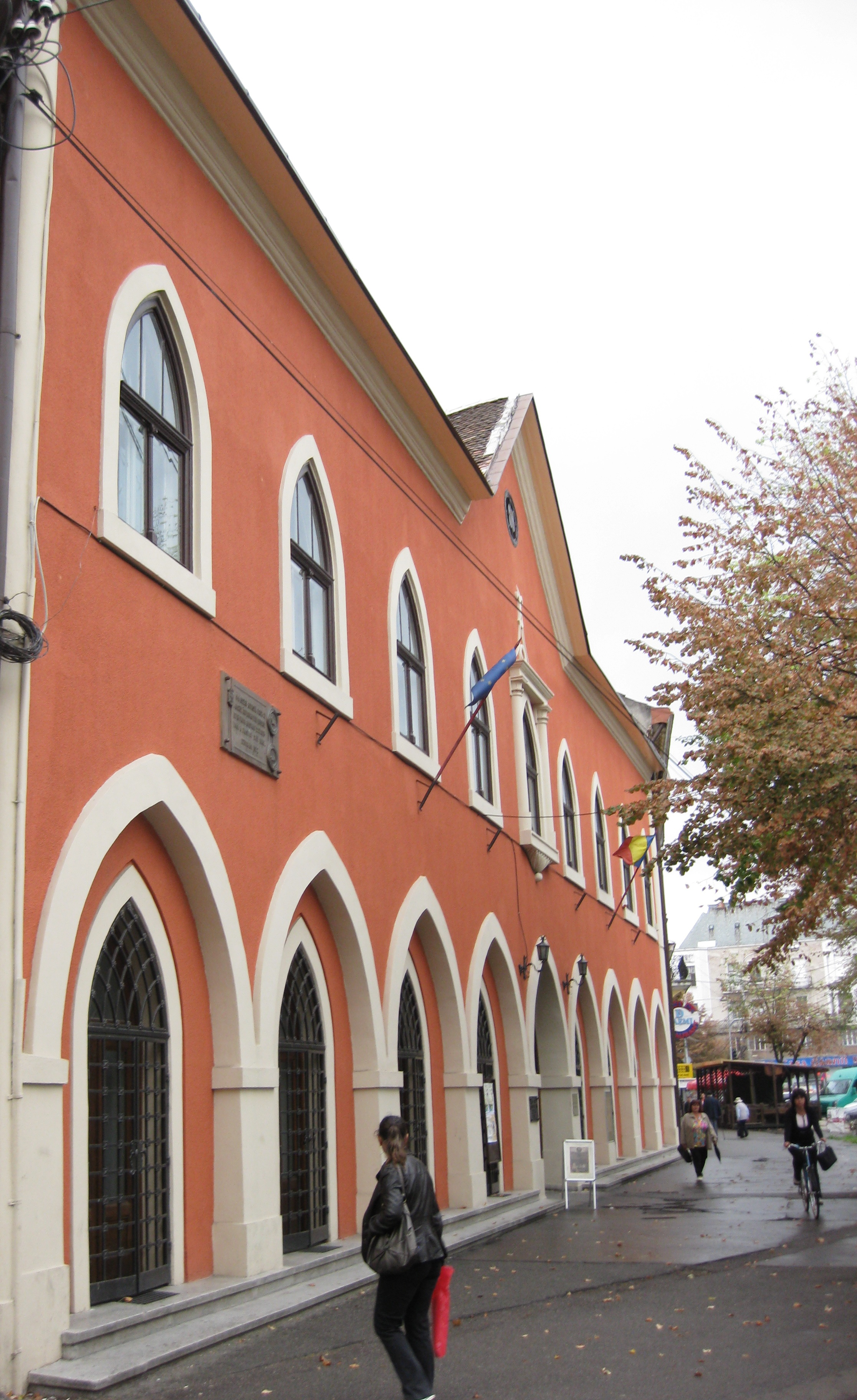 Casa Vécsey, azi Muzeul de Artă